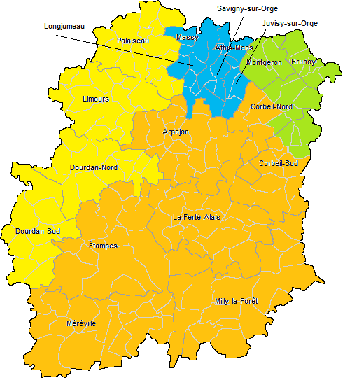 Carte des circonscriptions, canton et communes de l'Essonne (91) en 1967.